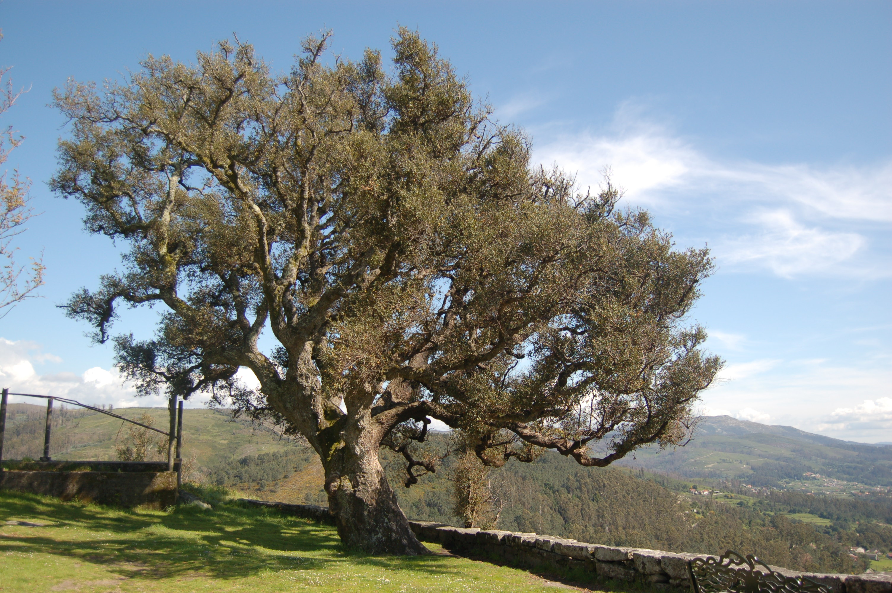 Sobreira no monte da Peneda (O Viso, Redondela)